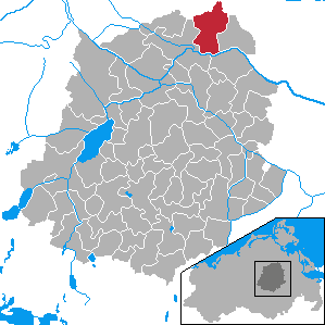 Sassen-Trantow, Landkreis Demmin, Mecklenburg-Vorpommern